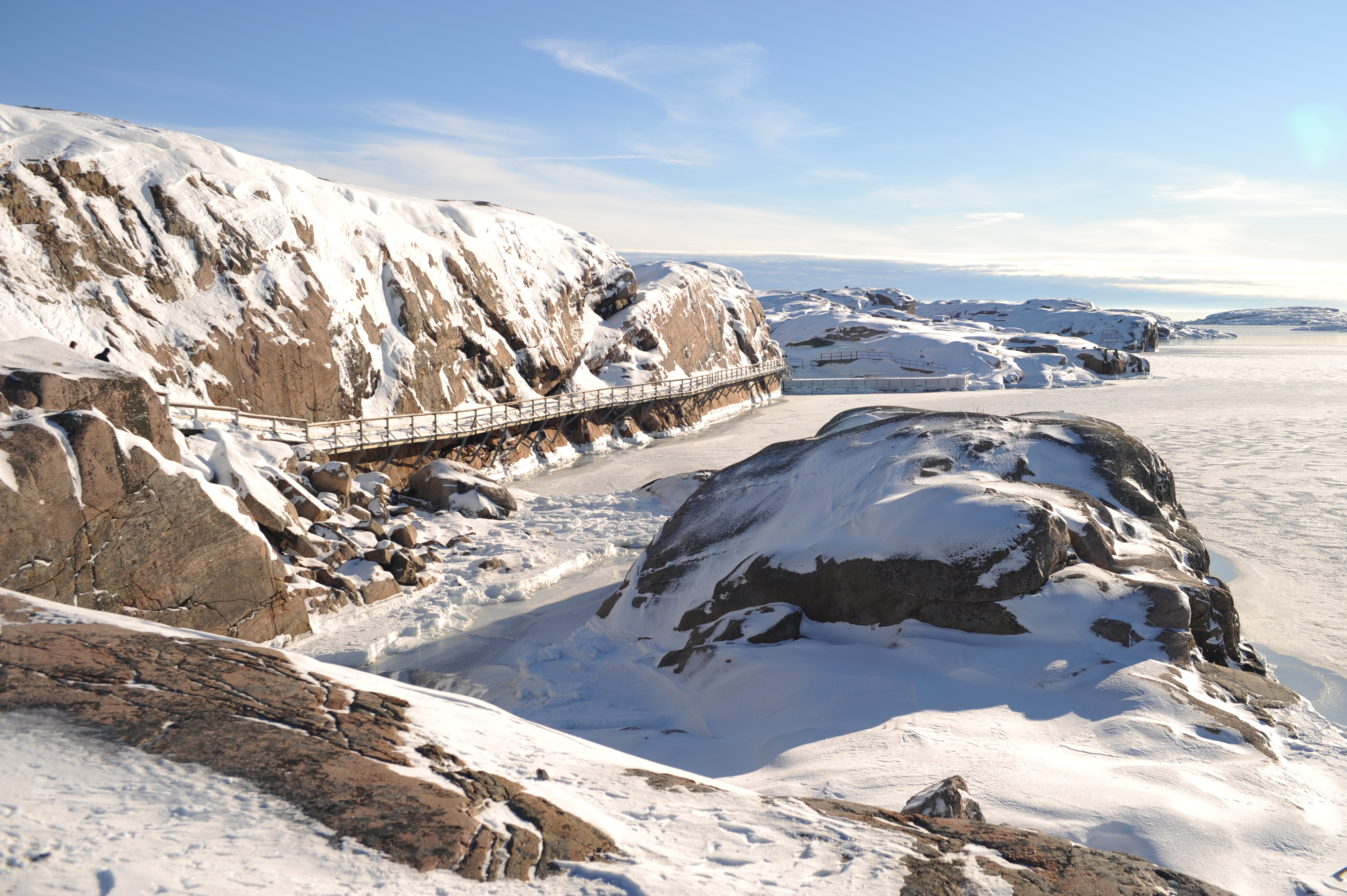 Vallevik fotat från Holländarbacken